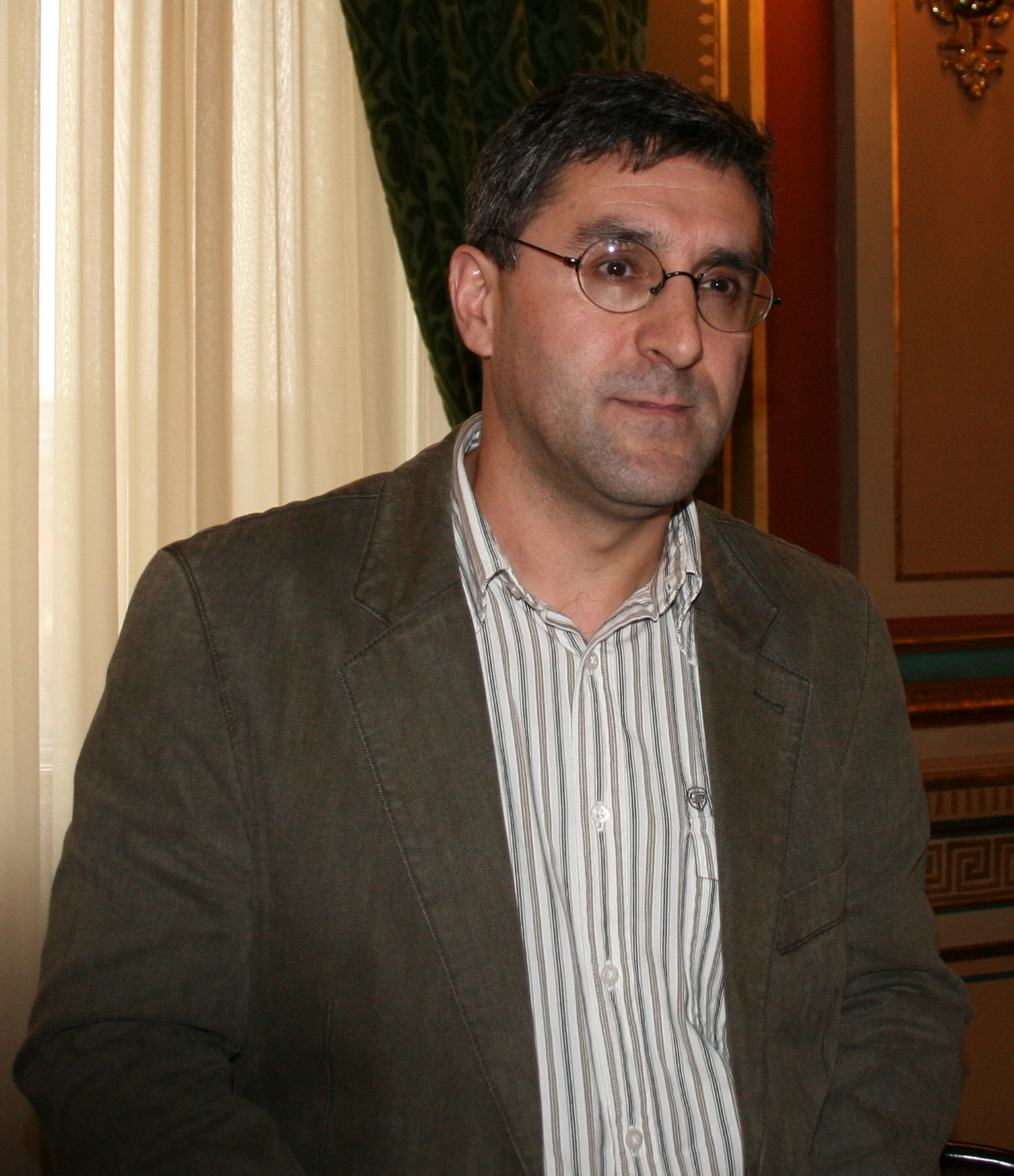 Davor Marijan na predstavljanju svoje knjige "Slom Titove armije" u studenom 2008.